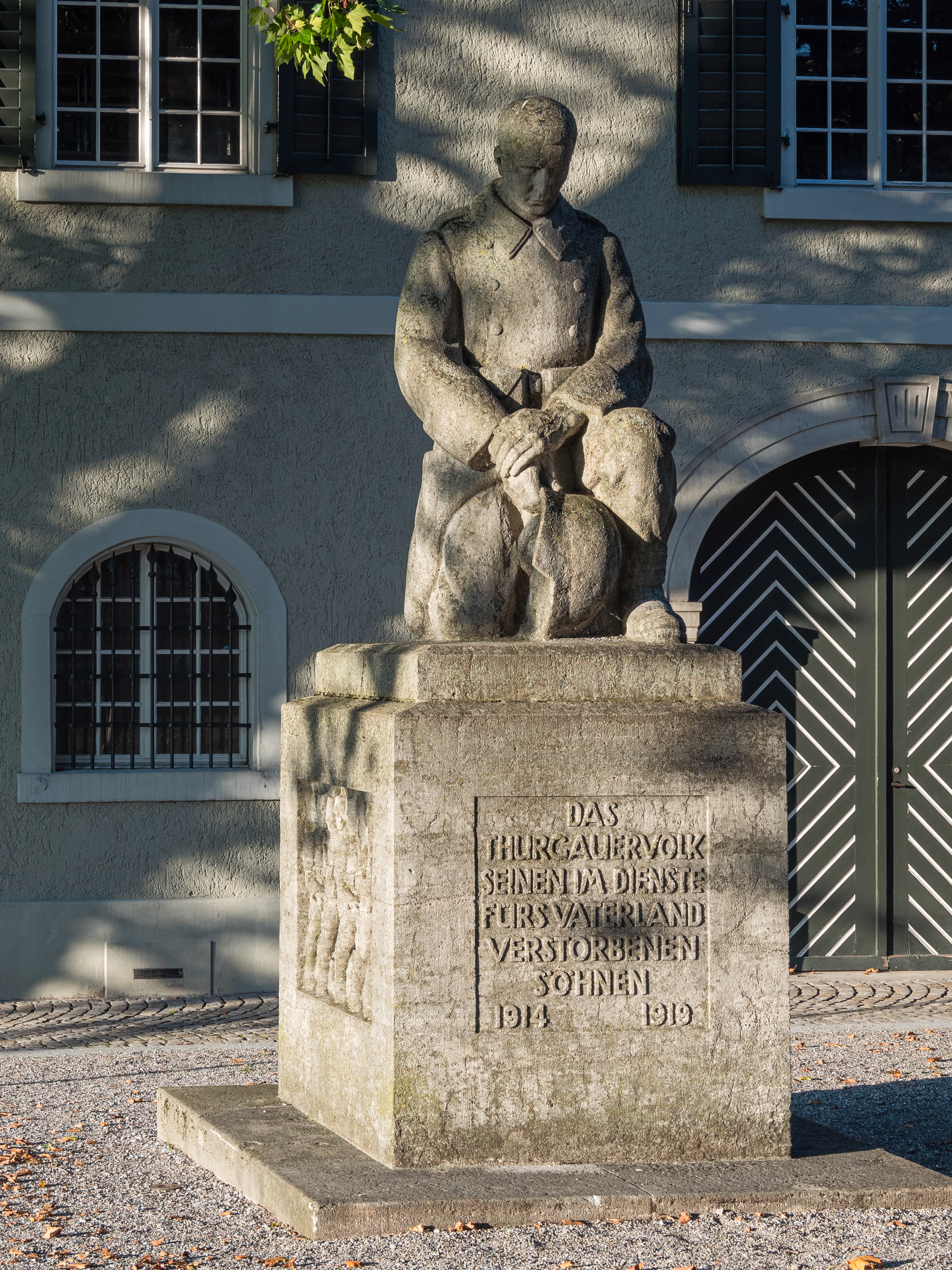 Frauenfeld: Soldatendenkmal von Otto Schilt (1888–1943) Bildhauer, für die während der Grenzbesetzung im 1. Weltkrieg verstorbenen Thurgauer Soldaten.